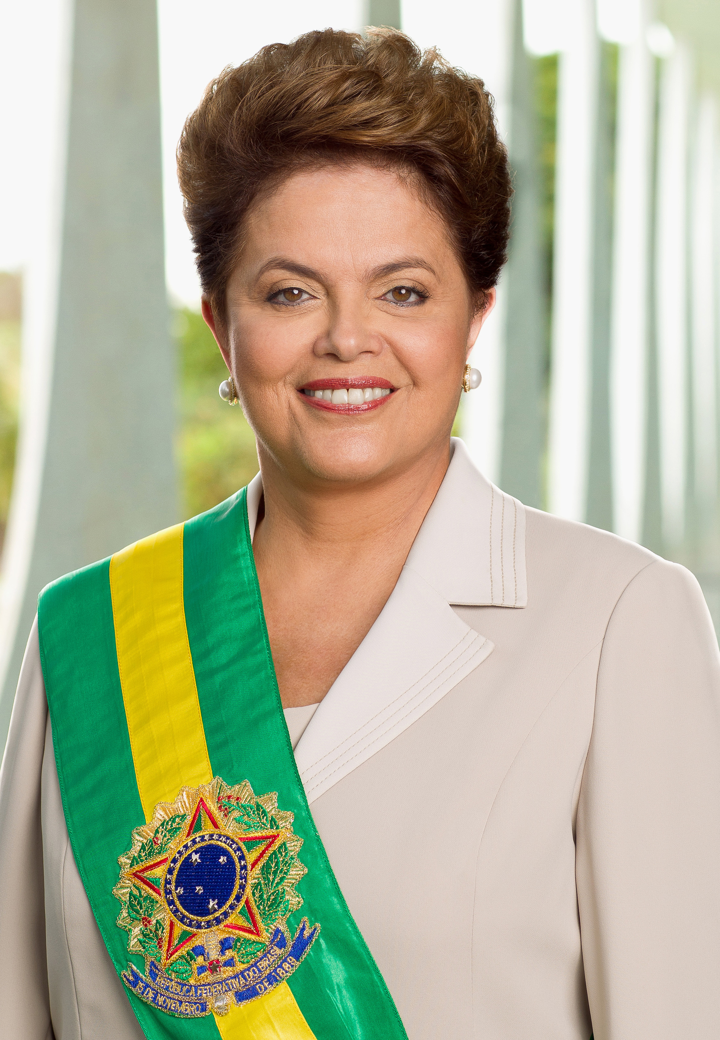 Foto oficial da presidente Dilma Rousseff feita no Palácio do Alvorada no dia 9 de janeiro de 2011 pelo fotografo oficial.